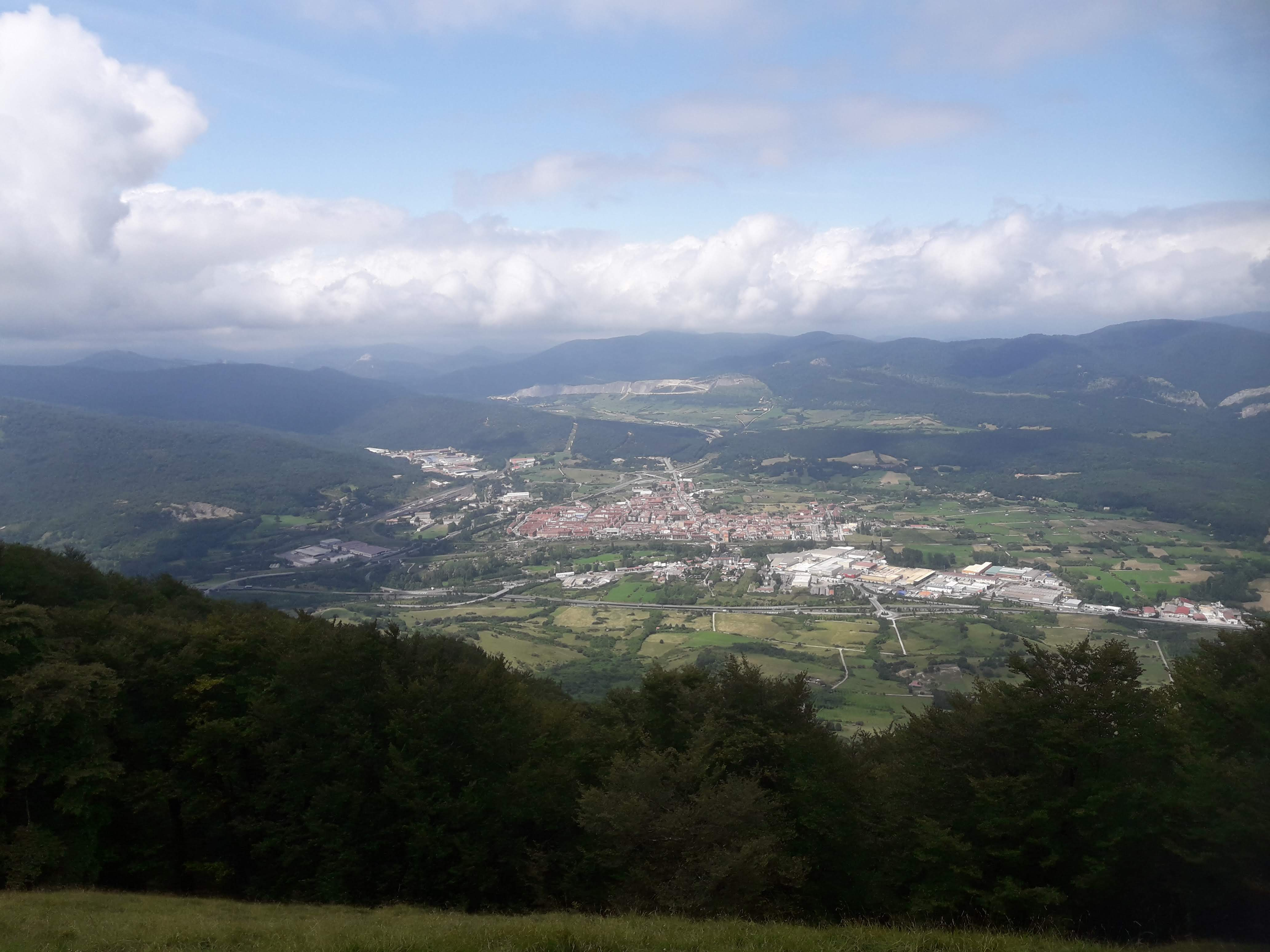 Fotos preses en una excursió al "mendizaleen ibilbidea" o camí dels muntanyencs, un itinerari des del centre d'informació que hi ha al coll d'Urbasa fins a la carena sobre la Sakana. La major part transcorre per fagedes i part del primer tram coincideix amb un itinerari adaptat.